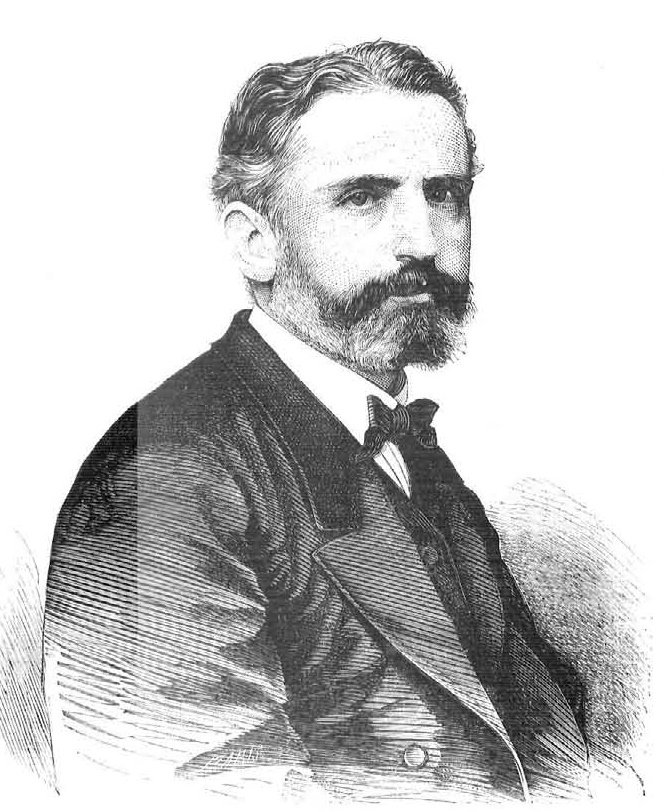 Antonio Arnao según grabado aparecido en La Ilustración Española y Americana con motivo de su ingreso en la Academia. Año XVII, n.º XV, 16 de abril de 1873, p. 248